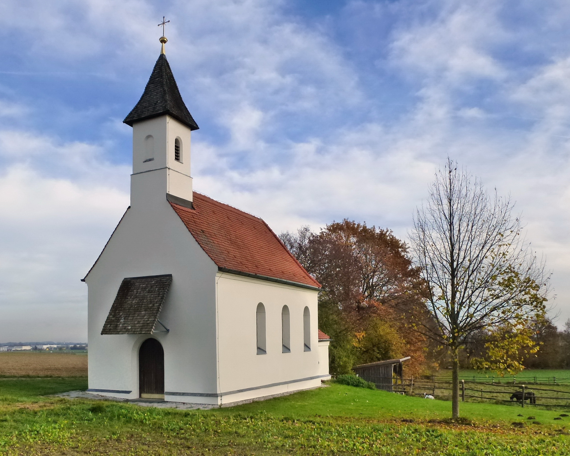 Fürstenfeldbruck, OT Lindach, Lindach 13, Kapelle St Rupert. Die Kapelle liegt außerhalb des Ortes auf einer Anhöhe. Auf der Nordseite 1 Fenster, auf der Südseite 3. Giebel-Dachreiter. Chor dreiseitig ausgebildet, daran verlängert in Achsrichtung eine kleine viereckige Sakristei. This is a photograph of an architectural monument.